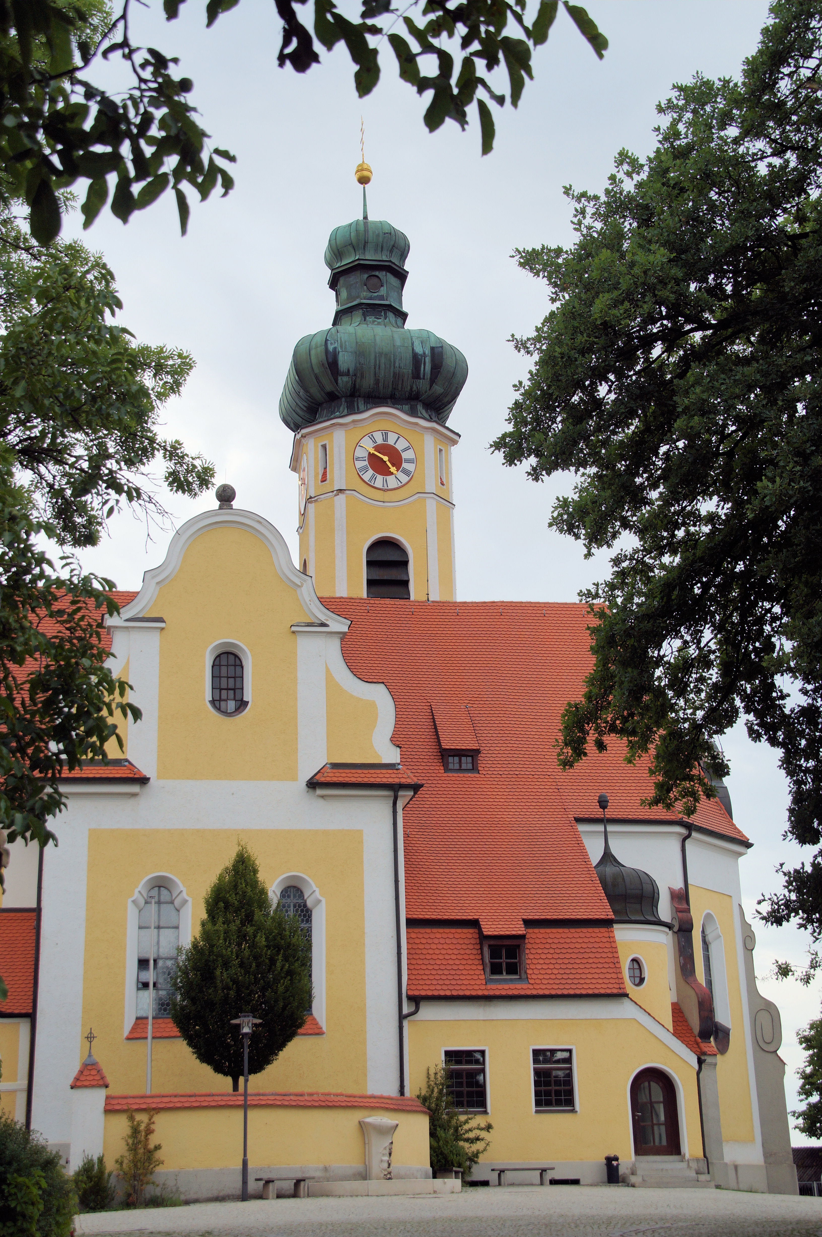 Katholische Pfarrkirche Mariä Himmelfahrt, Hohengebraching, Saalbau mit Halbwalm- und Walmdach, Flankenturm mit Zwiebelhaube und Putzgliederungen, neubarock, 1910-12 von Heinrich Hauberrisser, Langhaus im Kern 1783-85; mit Ausstattung; Reste der Friedhofsmauer, wohl 18. Jahrhundert.